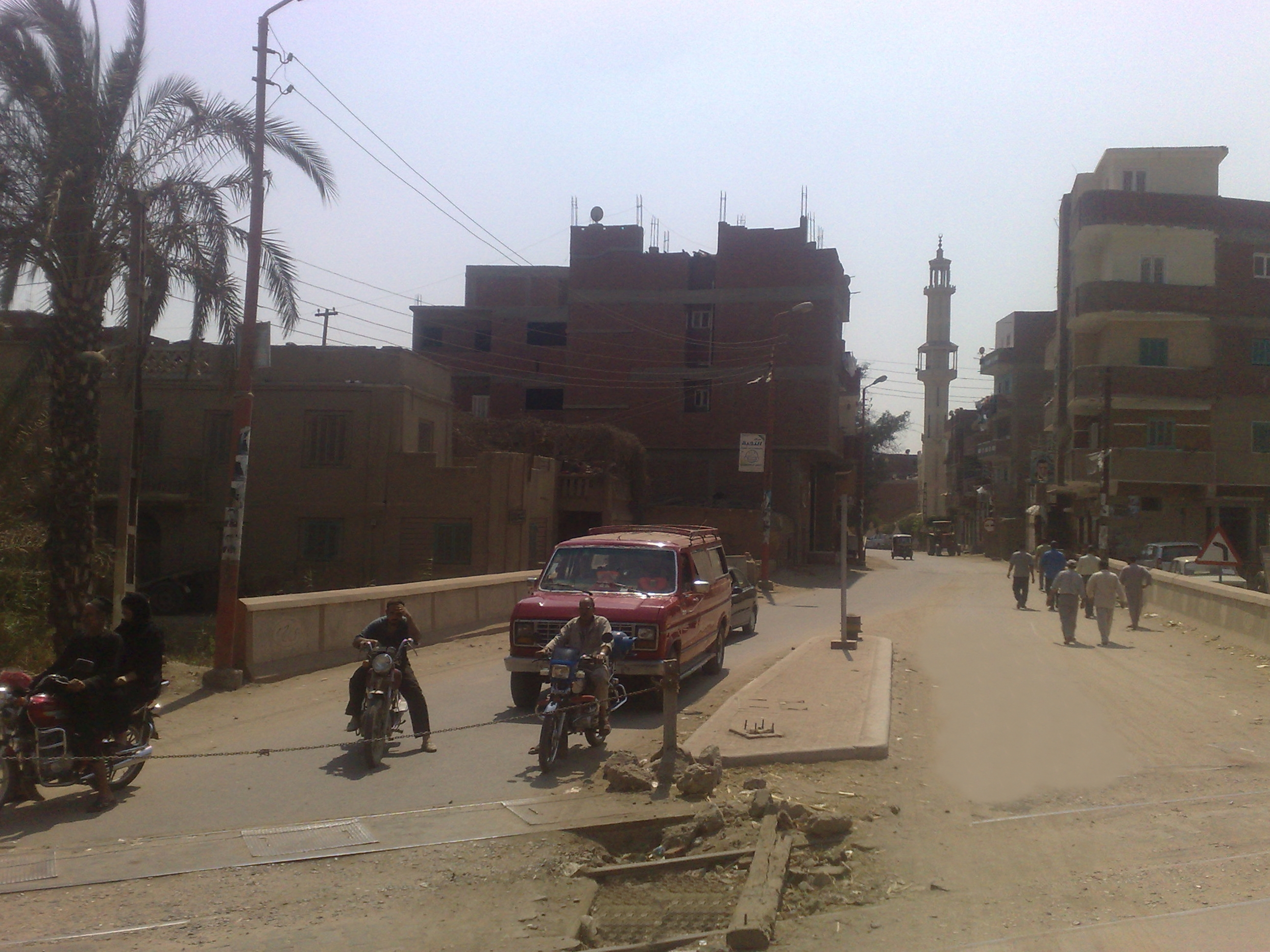 إحدى شوارع قرية البتانون